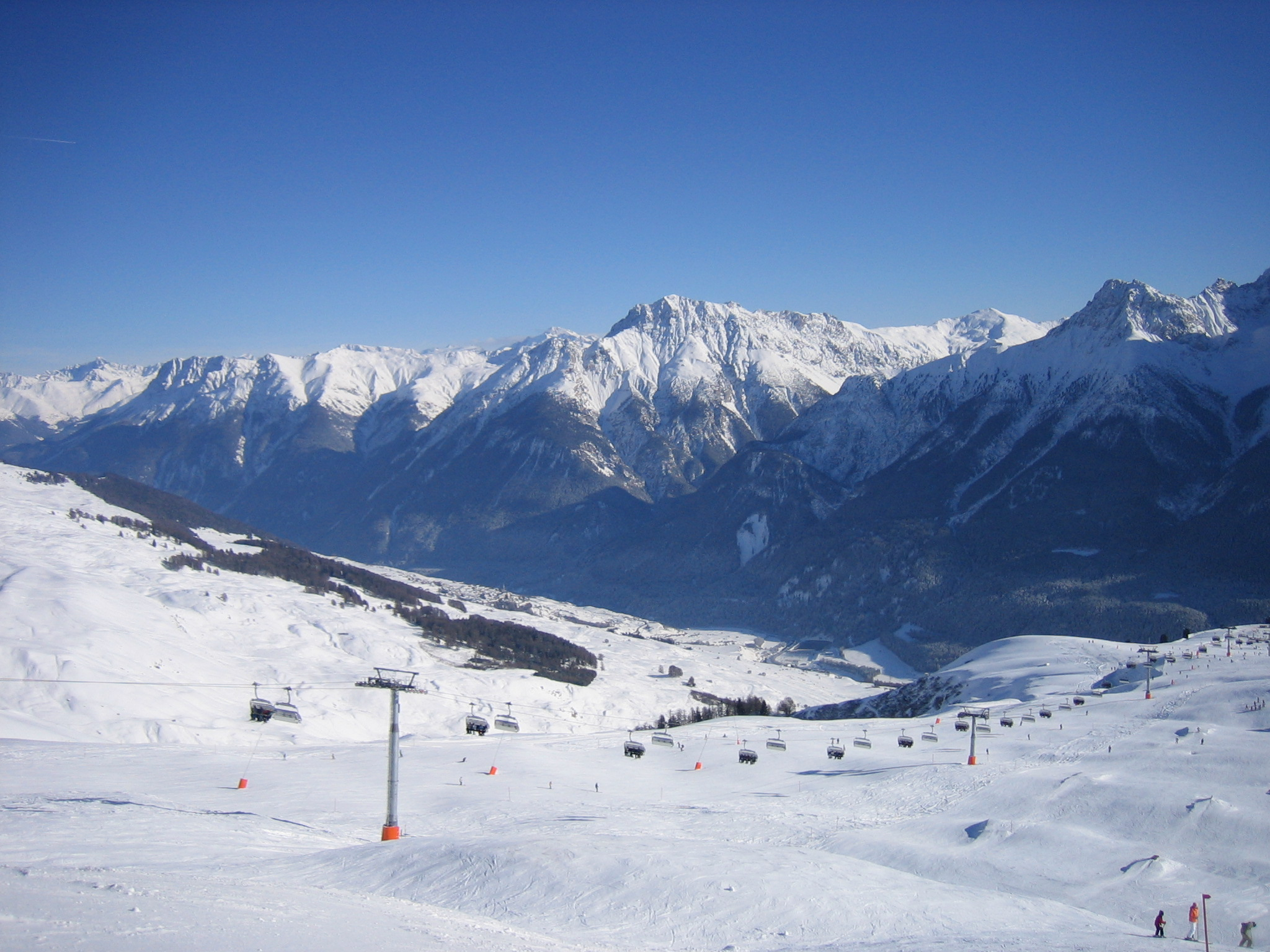 Blick von Schlivera (2300 m) über 6-er-Sessel Naluns Richtung Clozza Schlucht / Salez ins Tal. Leicht links der Mitte kann man unterhalb der Wälder am Sonnehang auf der Südhang-Terrasse Sent (1430 m) erahnen. Scuol liegt nicht sichtbar rechts im Talboden.